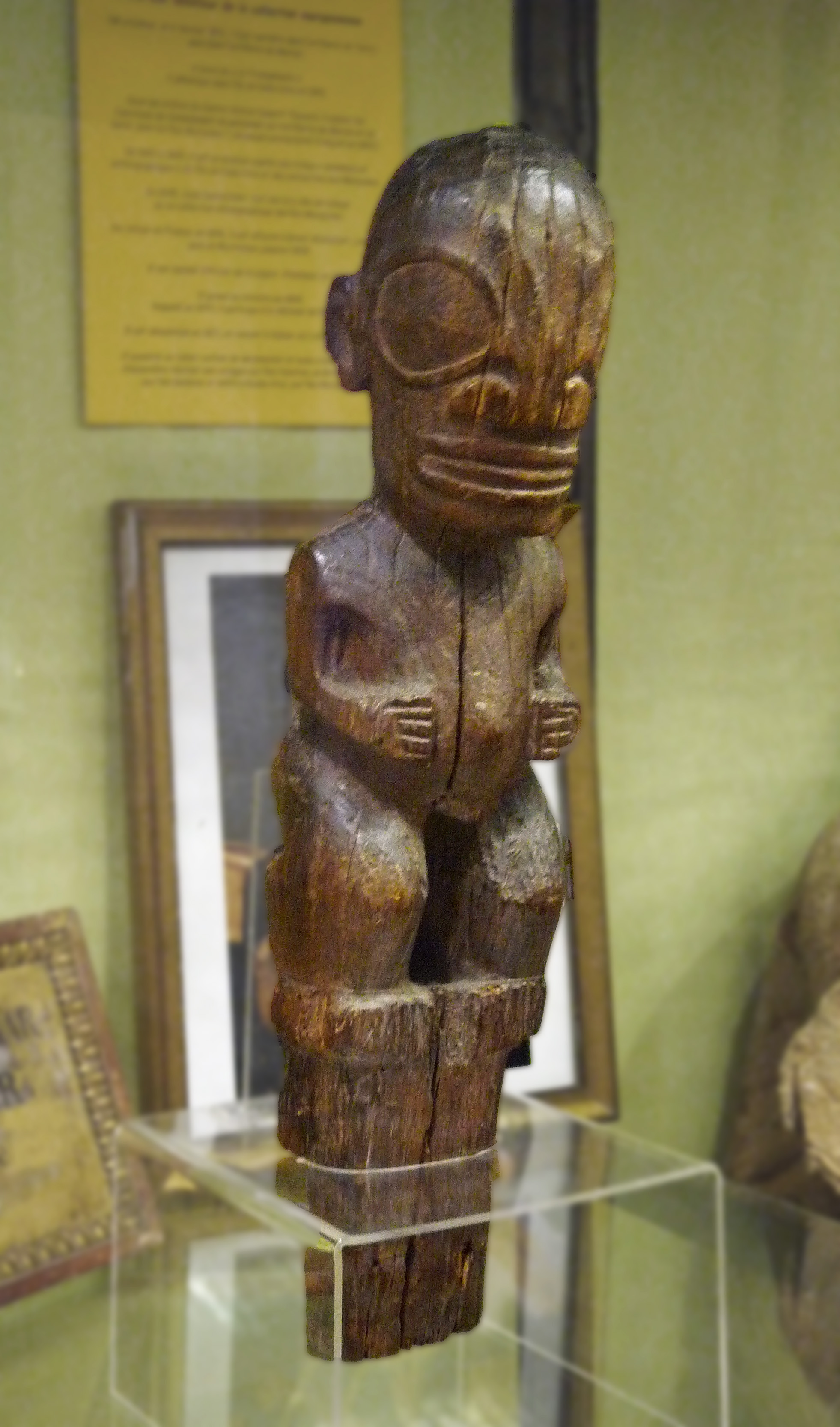 Tiki (tiki pou). Donné à la ville de Colmar en août 1845 par Daniel Rohr, capitaine d'artillerie de marine. Musée d'histoire naturelle et d'ethnographie de Colmar